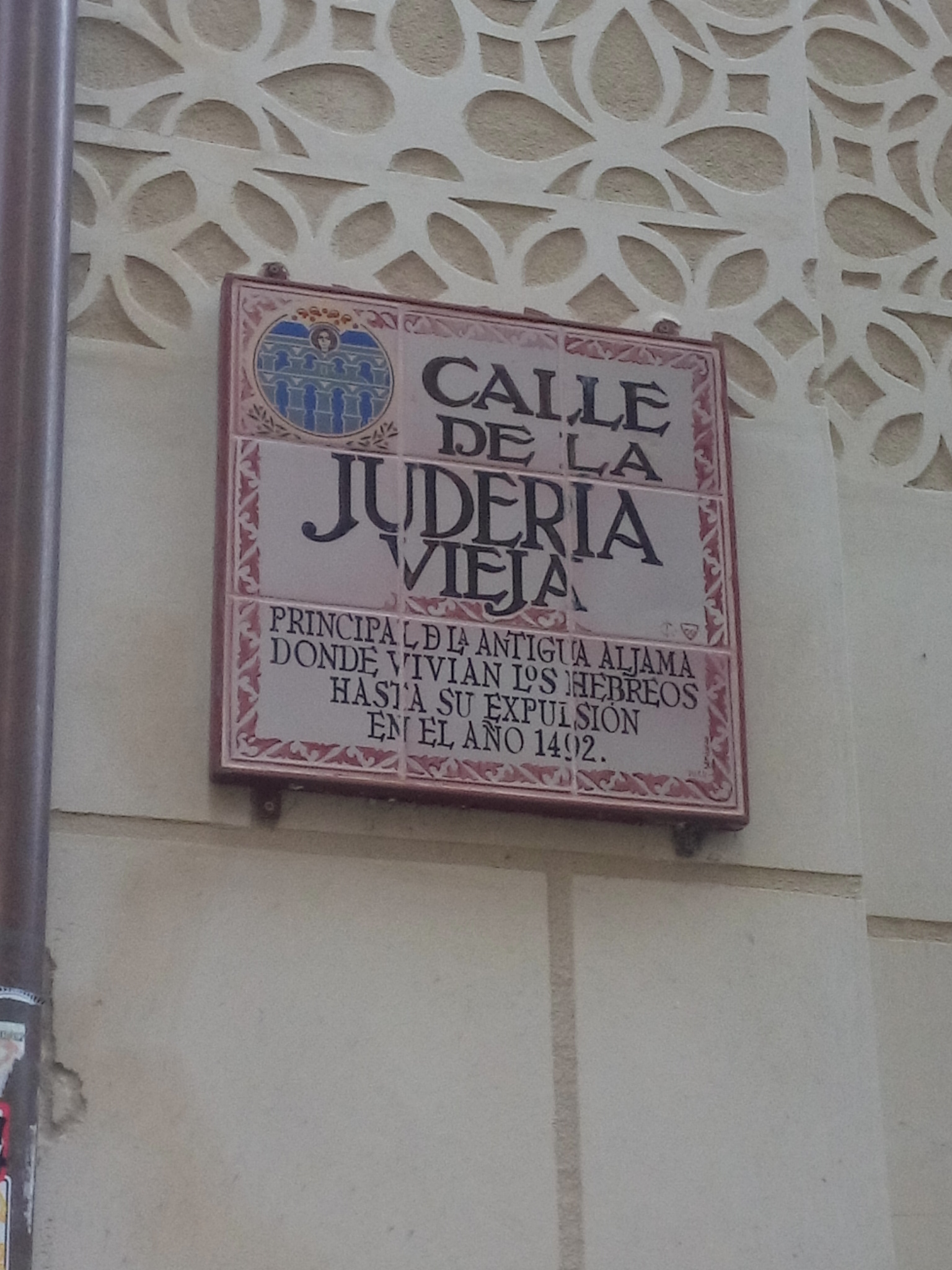 Calle principal de la antigua aljama